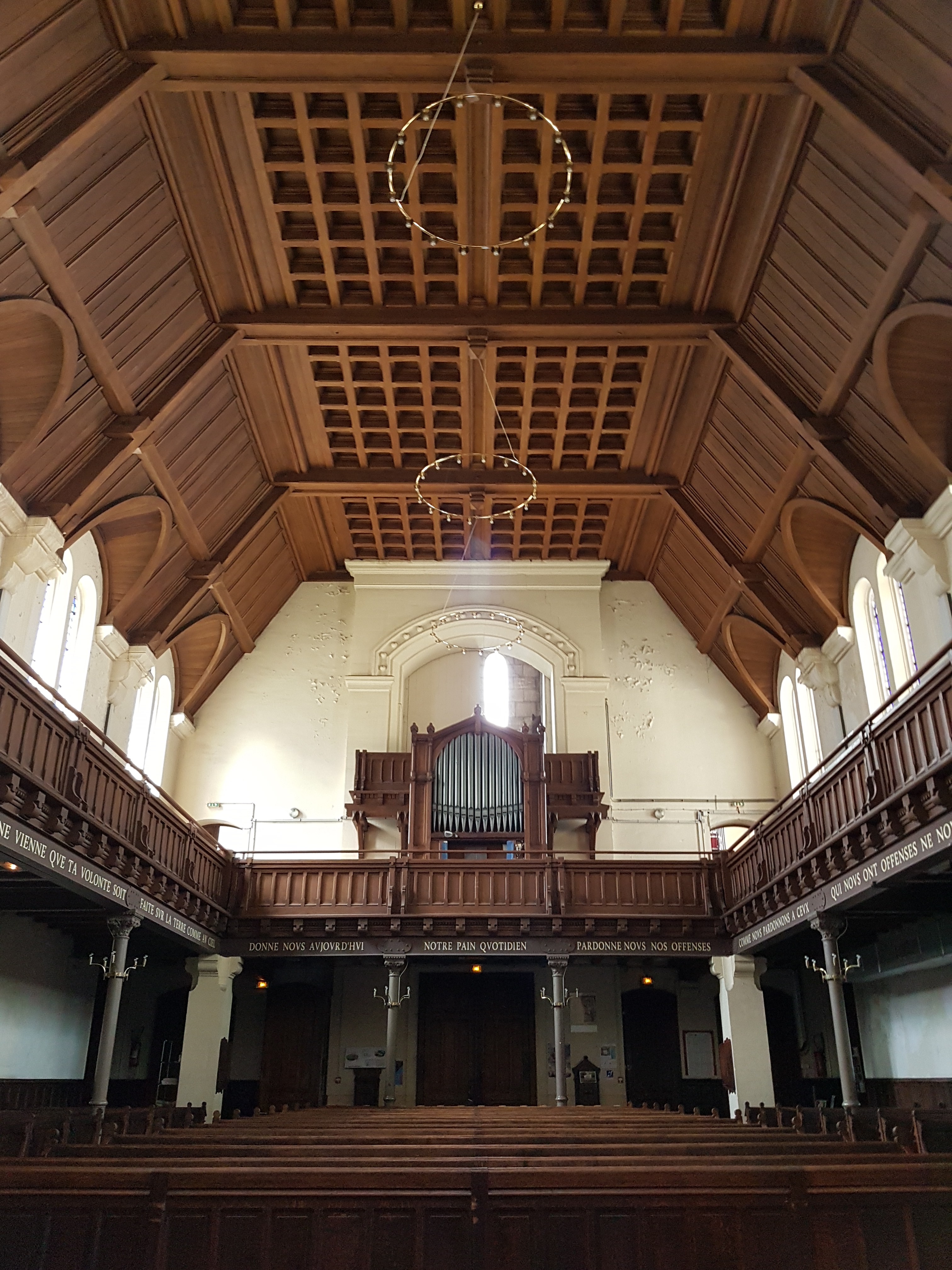 Intérieur du temple protestant de Lille, côté orgue